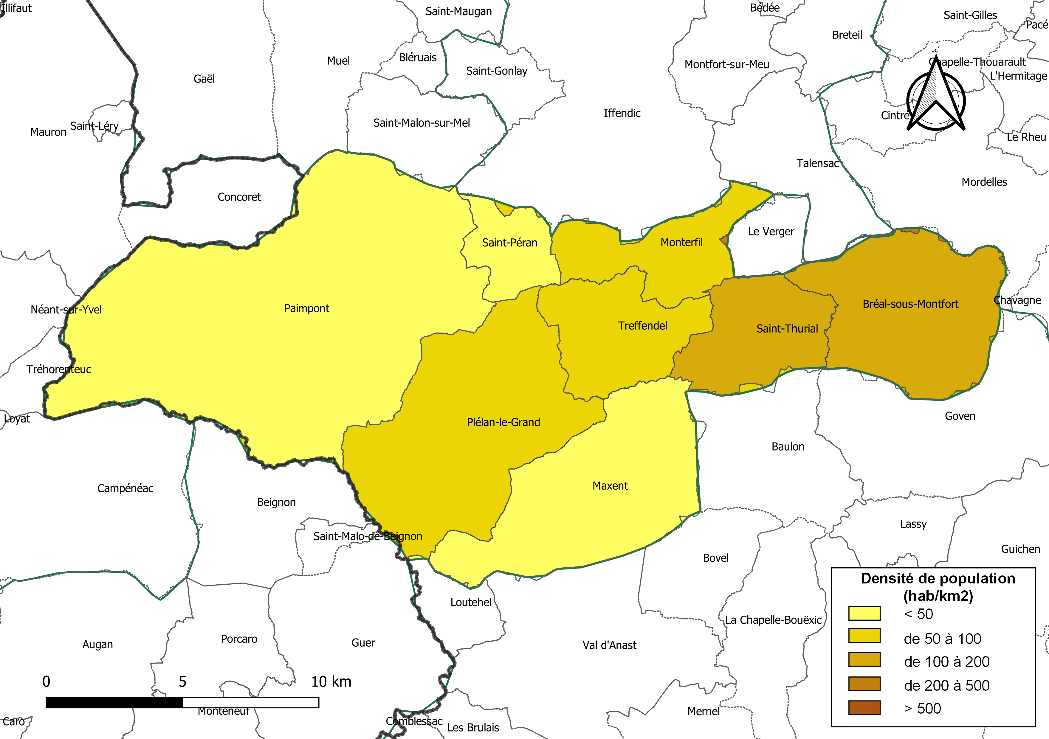 Carte des densités de population (millésimée 2016) des communes de la Communauté de communes de Brocéliande, département d'Ille-et-Vilaine, France. Composition au 1er janvier 2019.